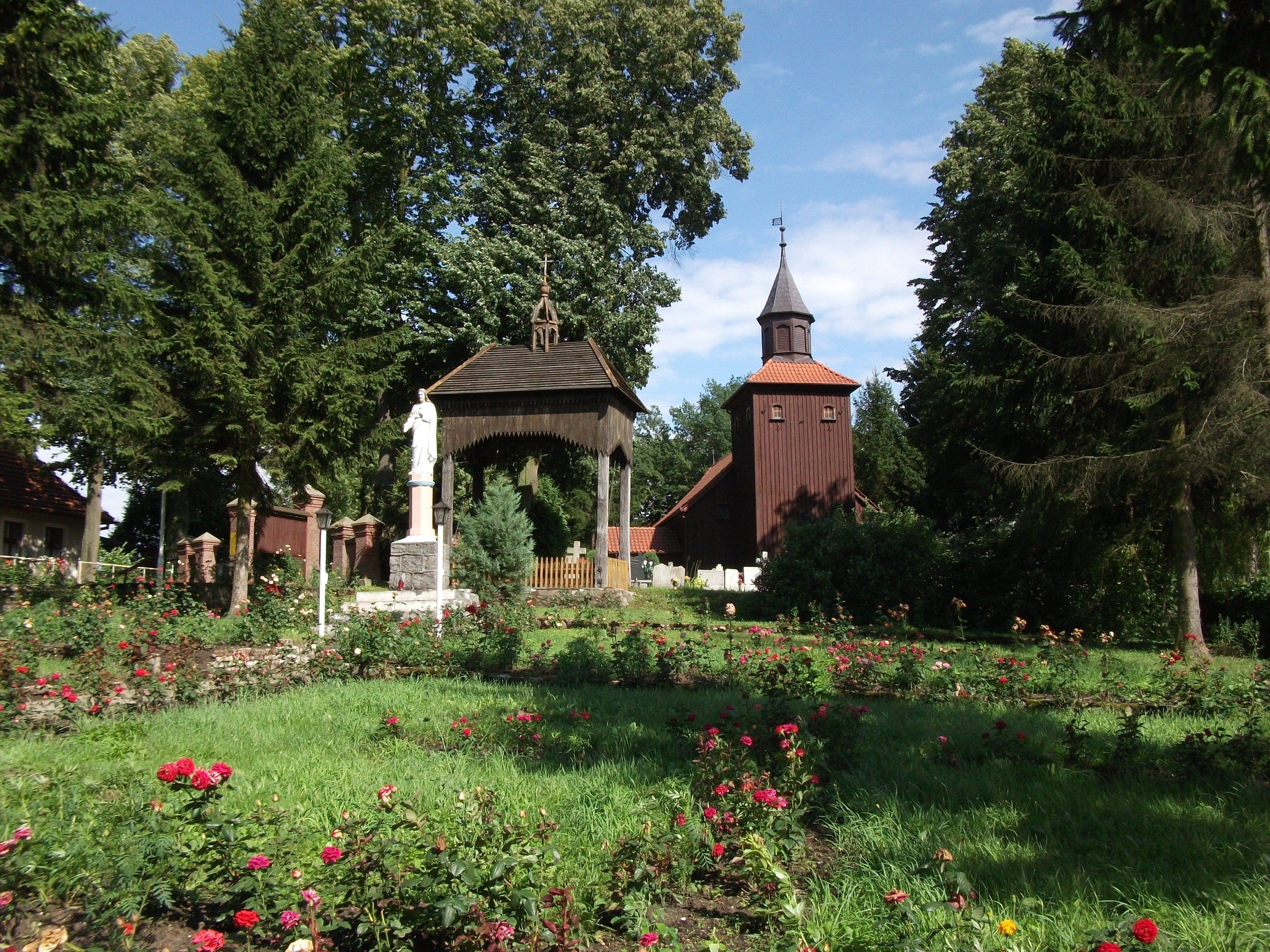 Kościół w Szembruku